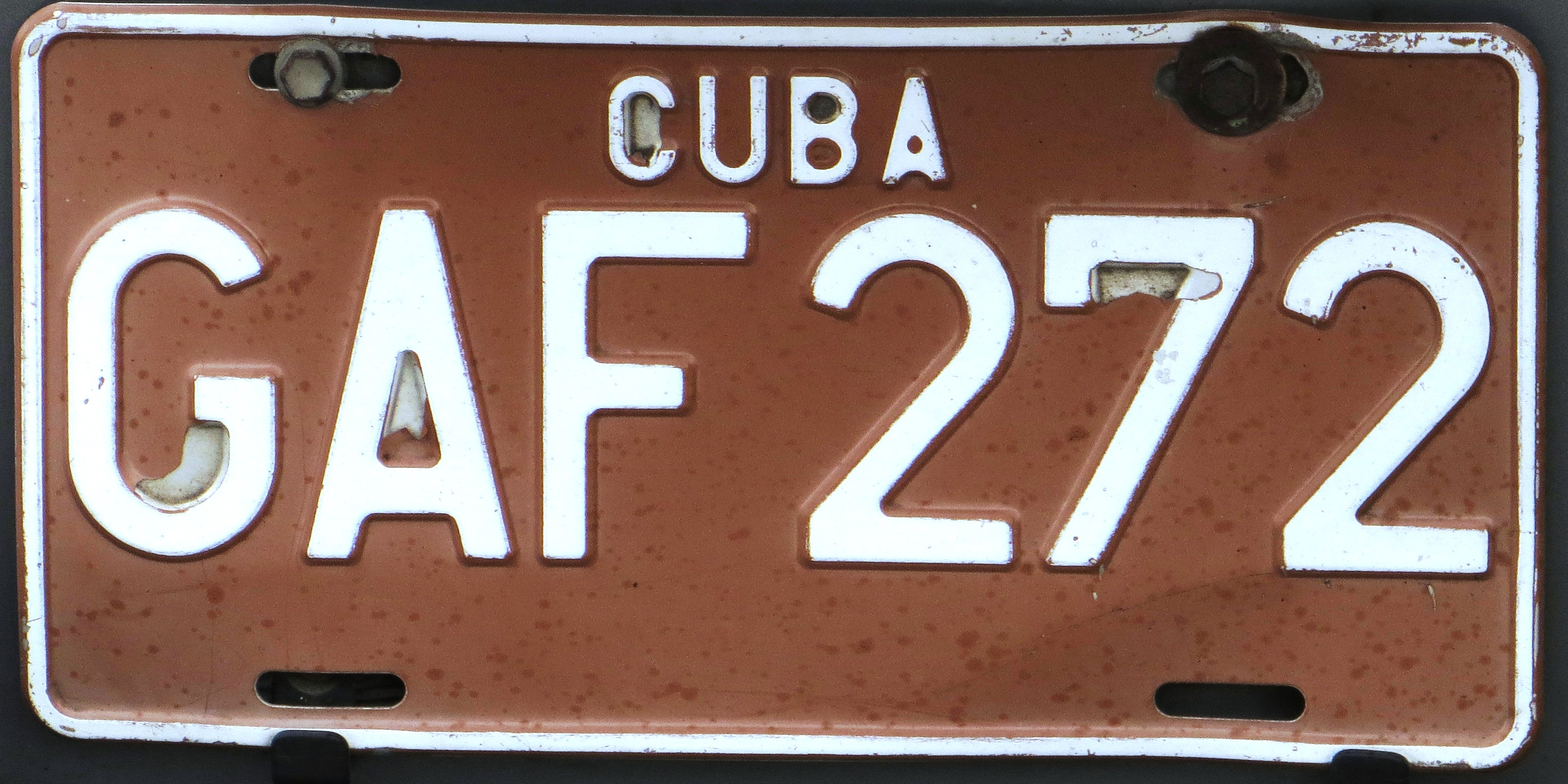 Kentekenplaat uit Cuba